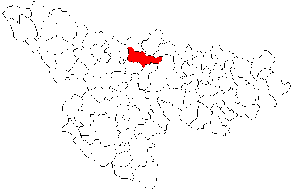 Categorie:Hărţi ale judeţului Timiş